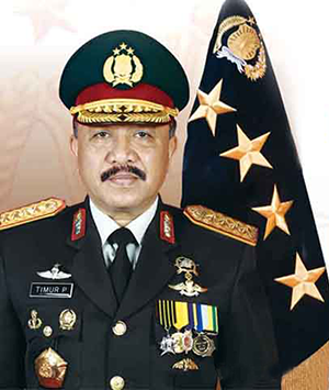 Jenderal Polisi Timur Pradopo sebagai Kapolri